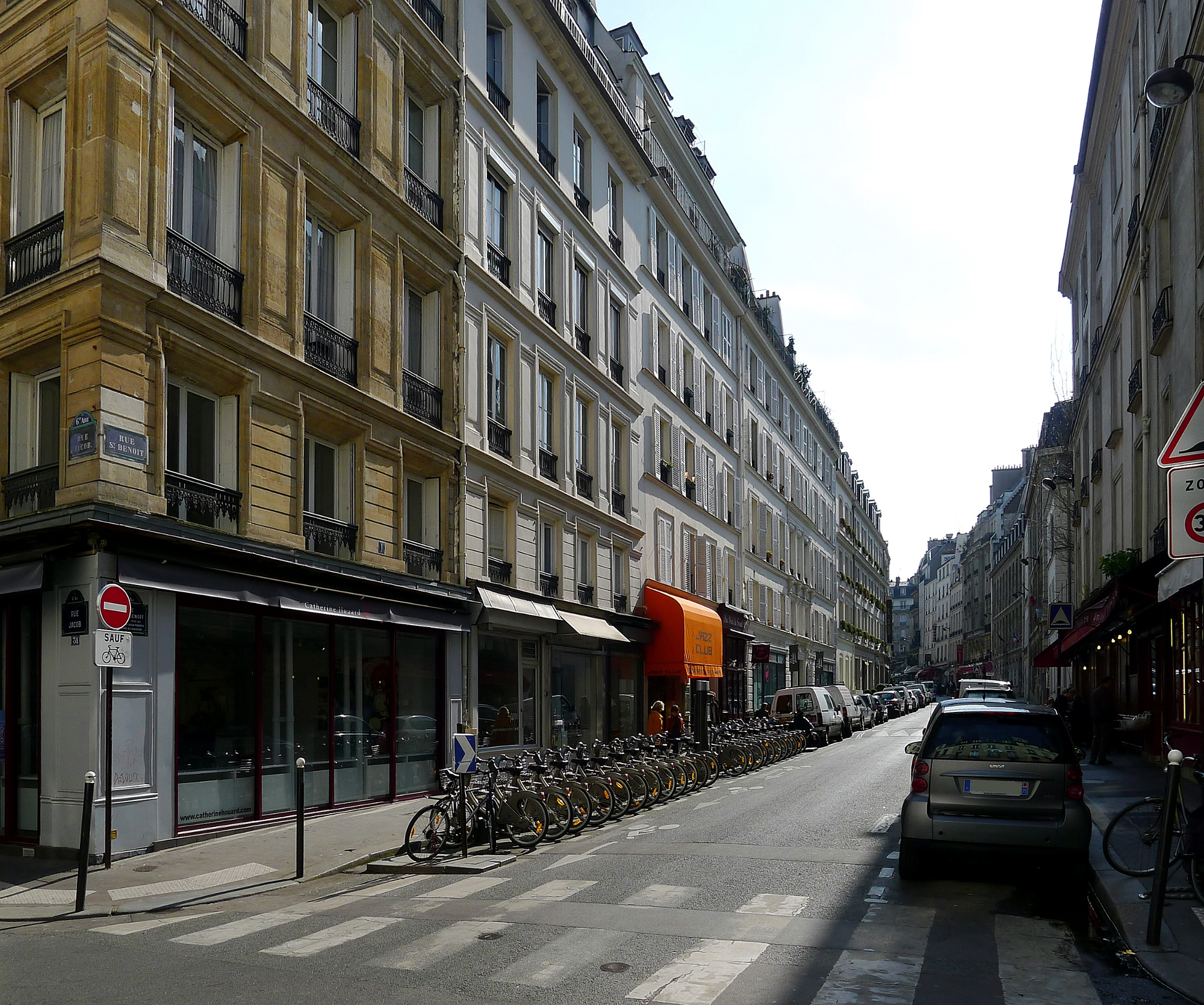 Rue Saint-Benoît - Paris VI